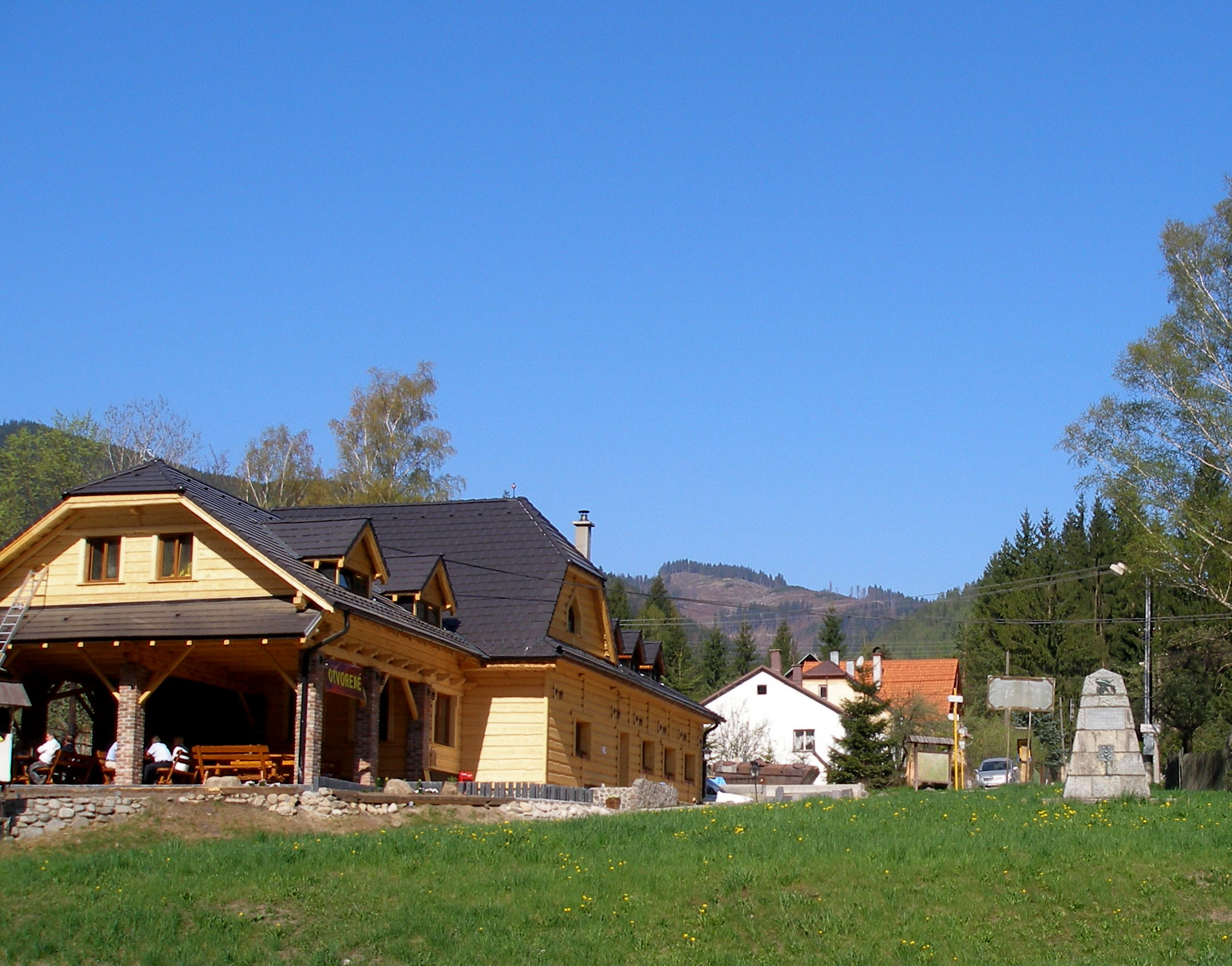 Osada Podsuchá je miestnou časťou mesta Ružomberok. Historický región Liptov.